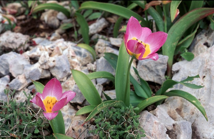 Tulipa bakeri (determined by user:RLJ)